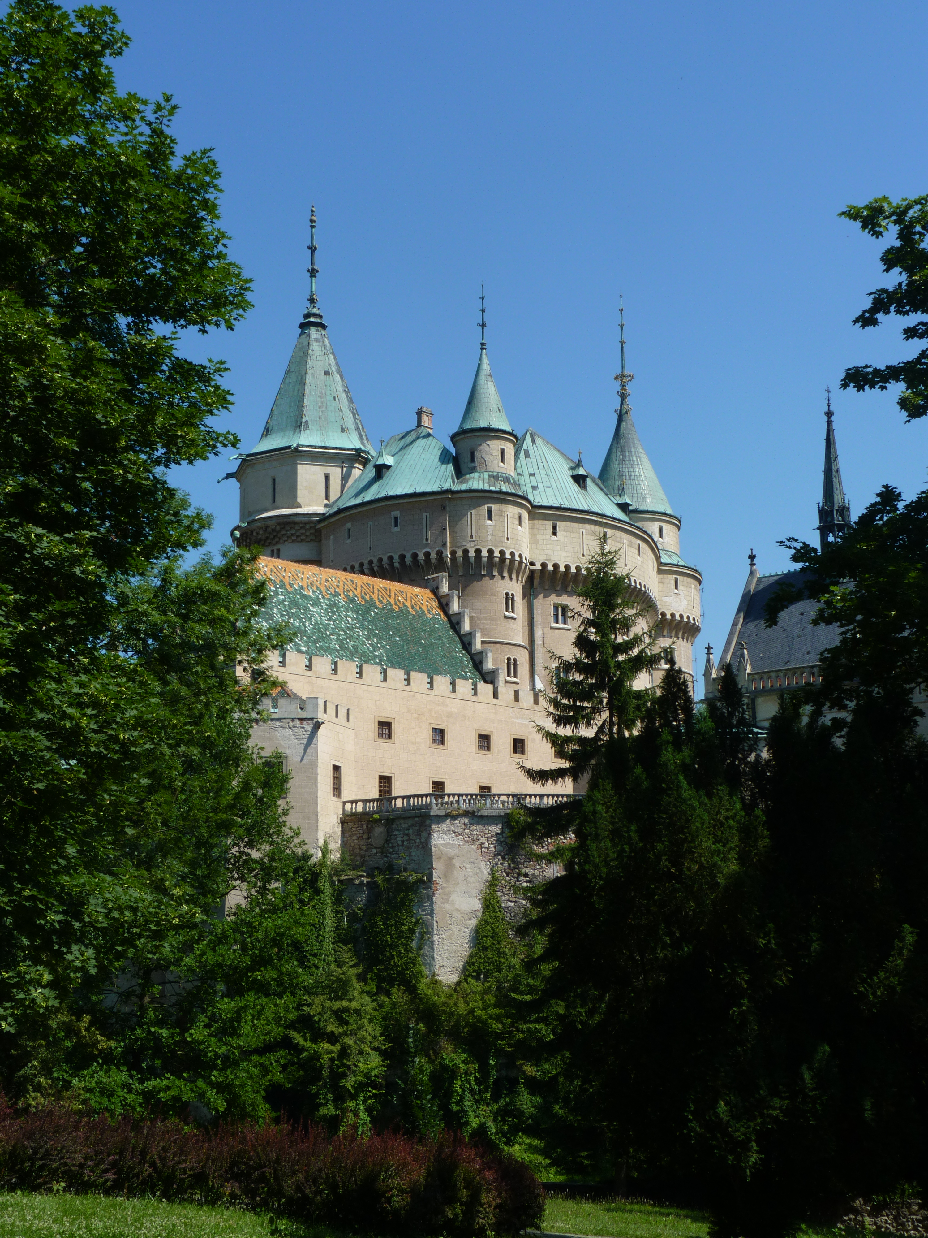 Veža schodisková